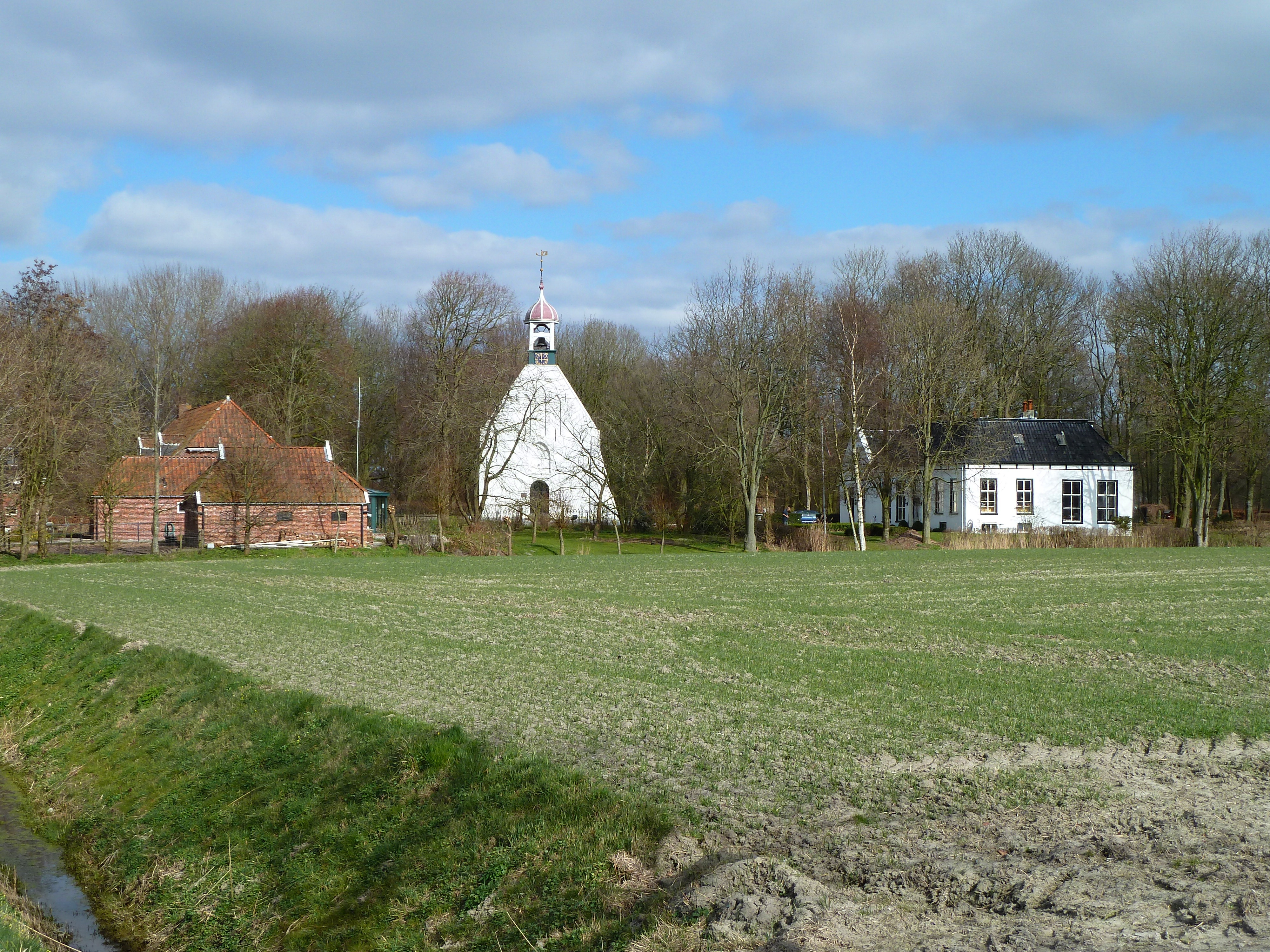 Arbeidershuizen, de kerk en de pastorie van Breede.